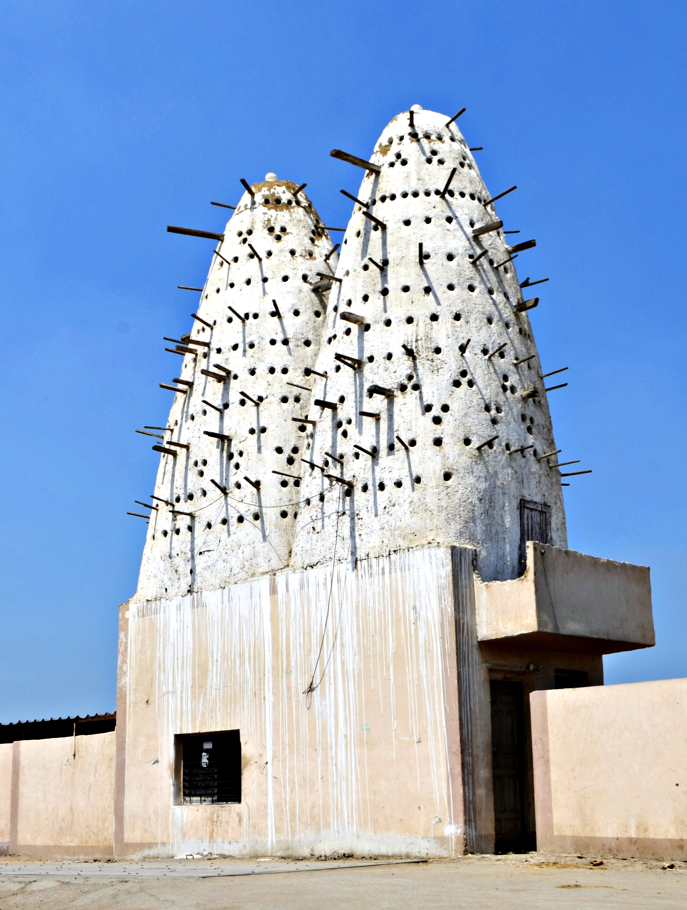 برجيّ حمام بقرية التوفيقية، محافظة البحيرة، مصر